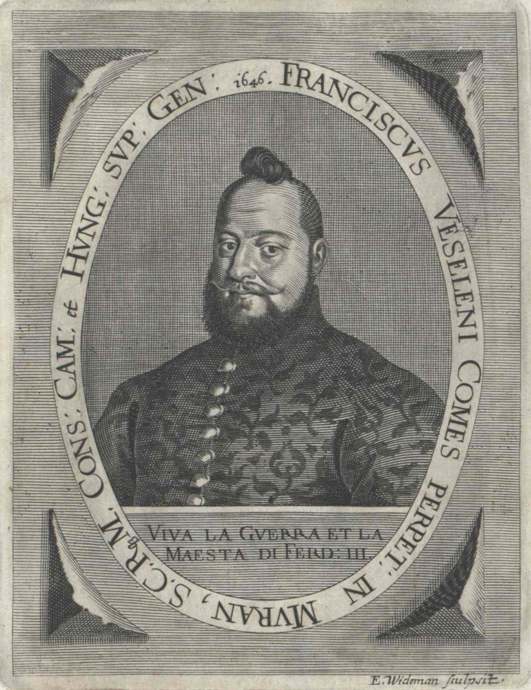 Wesselényi Ferenc (1605–1667) nádor portréja. Elias Widemann rézmetszete (1646)